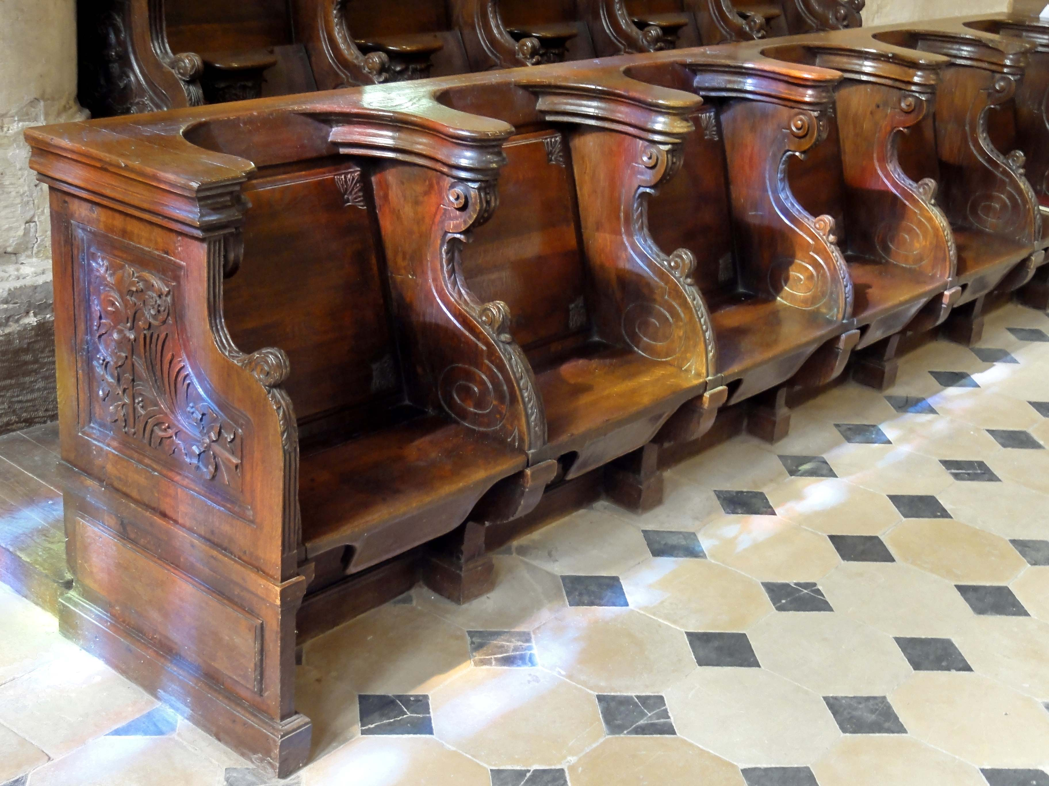 Stalles côté sud, 2e rang.